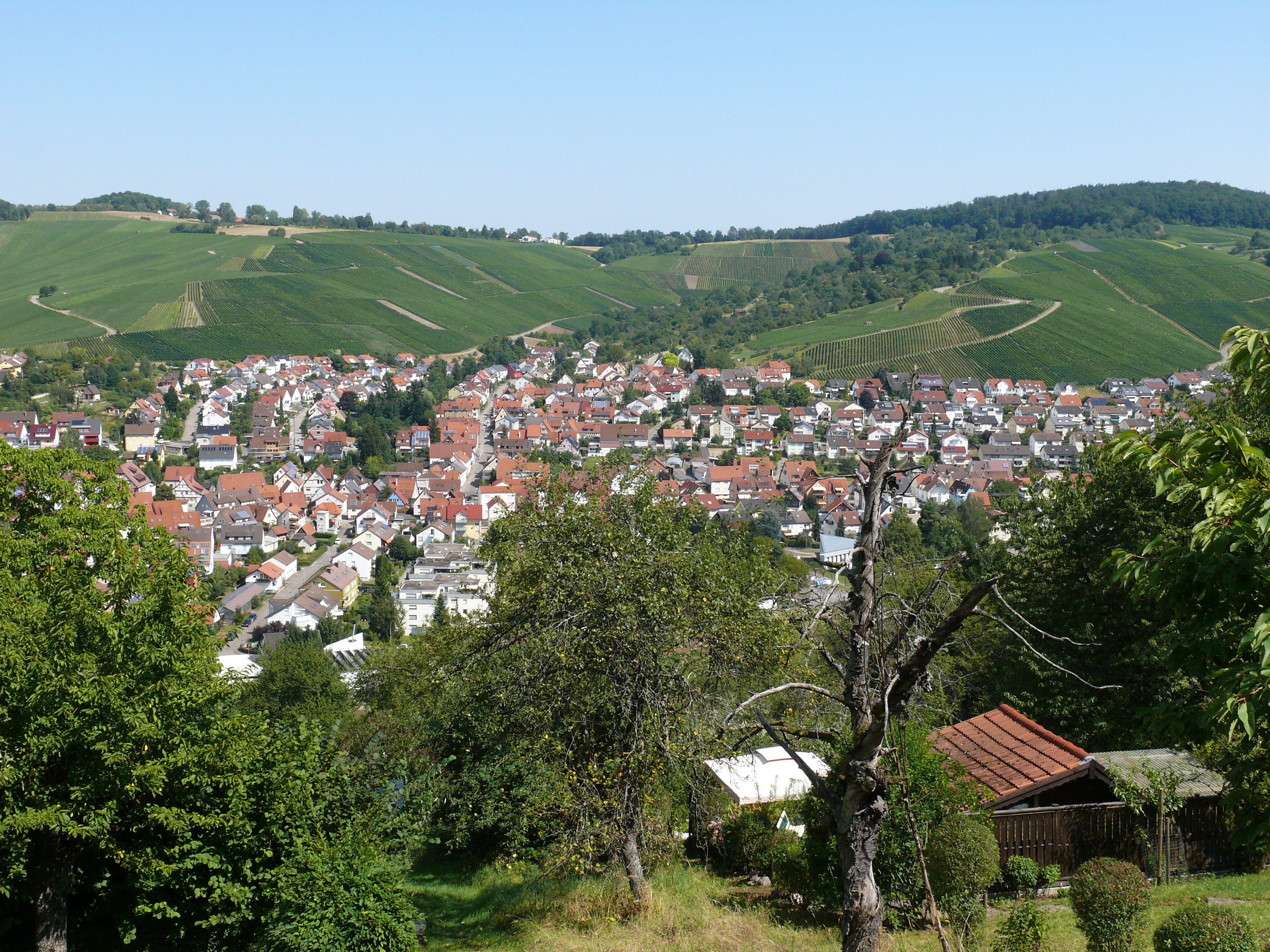 Blick auf Weinstadt-Schnait aus südlicher Richtung vom Aichelberg.